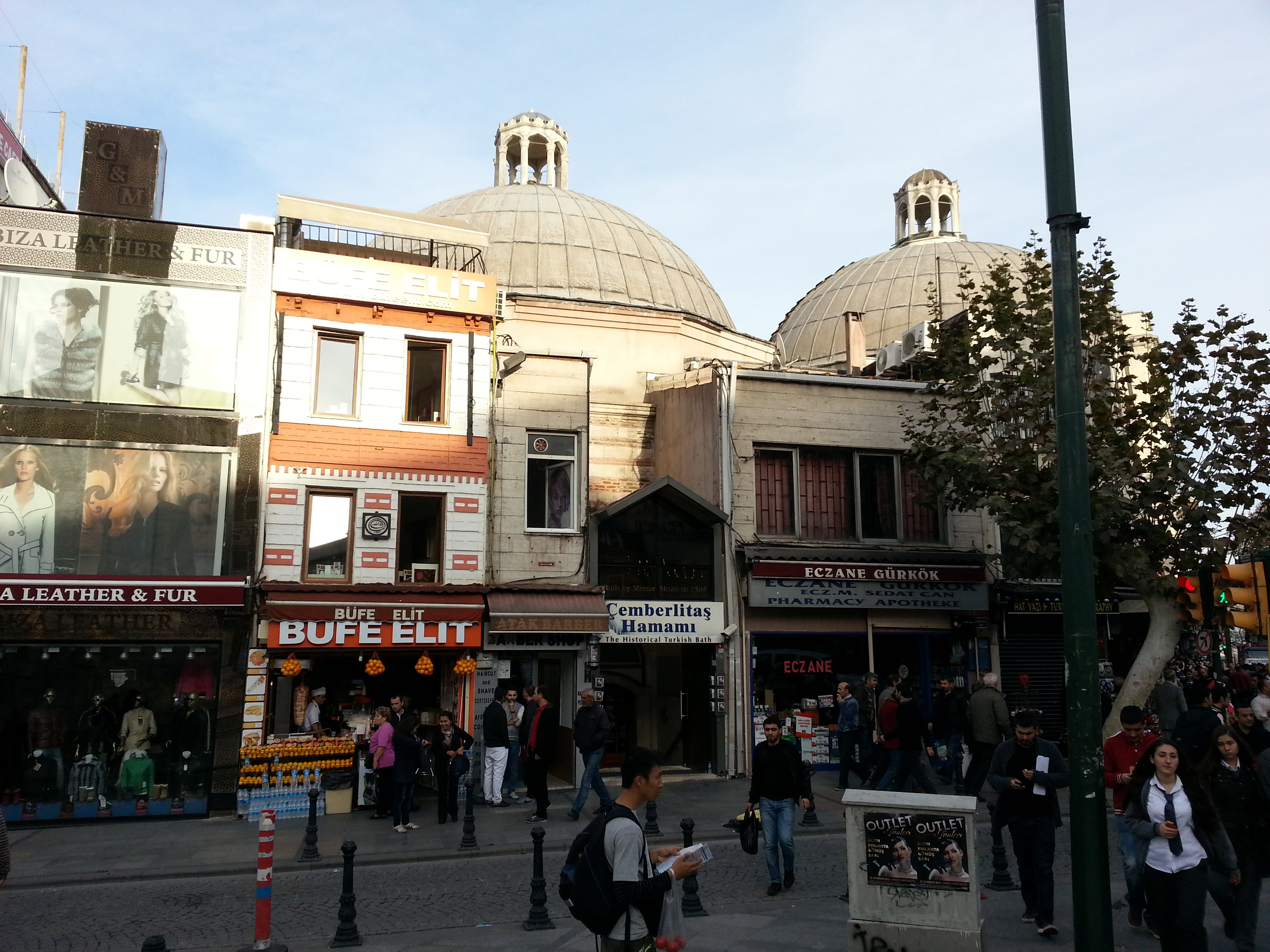 Istanbul